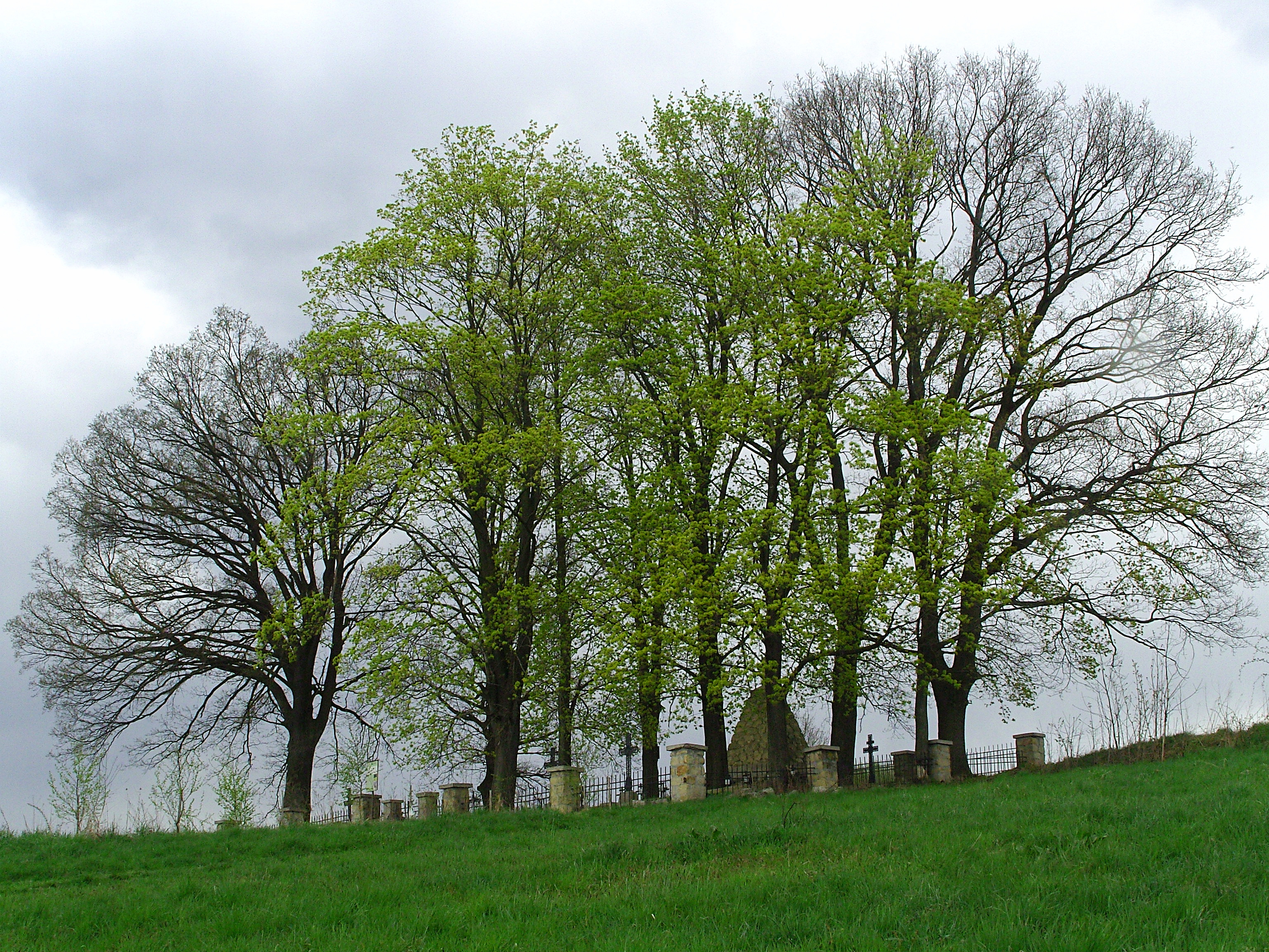 Cmentarz wojenny nr 26 w Sławęcinie (widok ogólny). Miejsce spoczynku żołnierzy poległych w grudniu 1914 i maju 1915 roku.